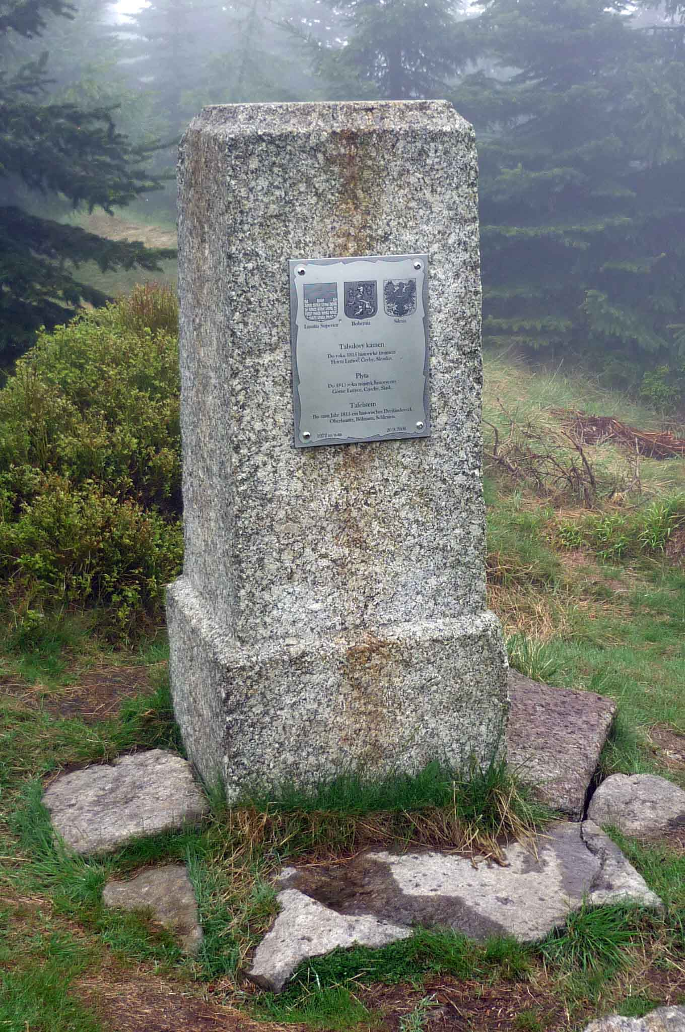 Dawny kamień graniczny zwany "Kamieniem Stołowym" po polskiej stronie Smreka